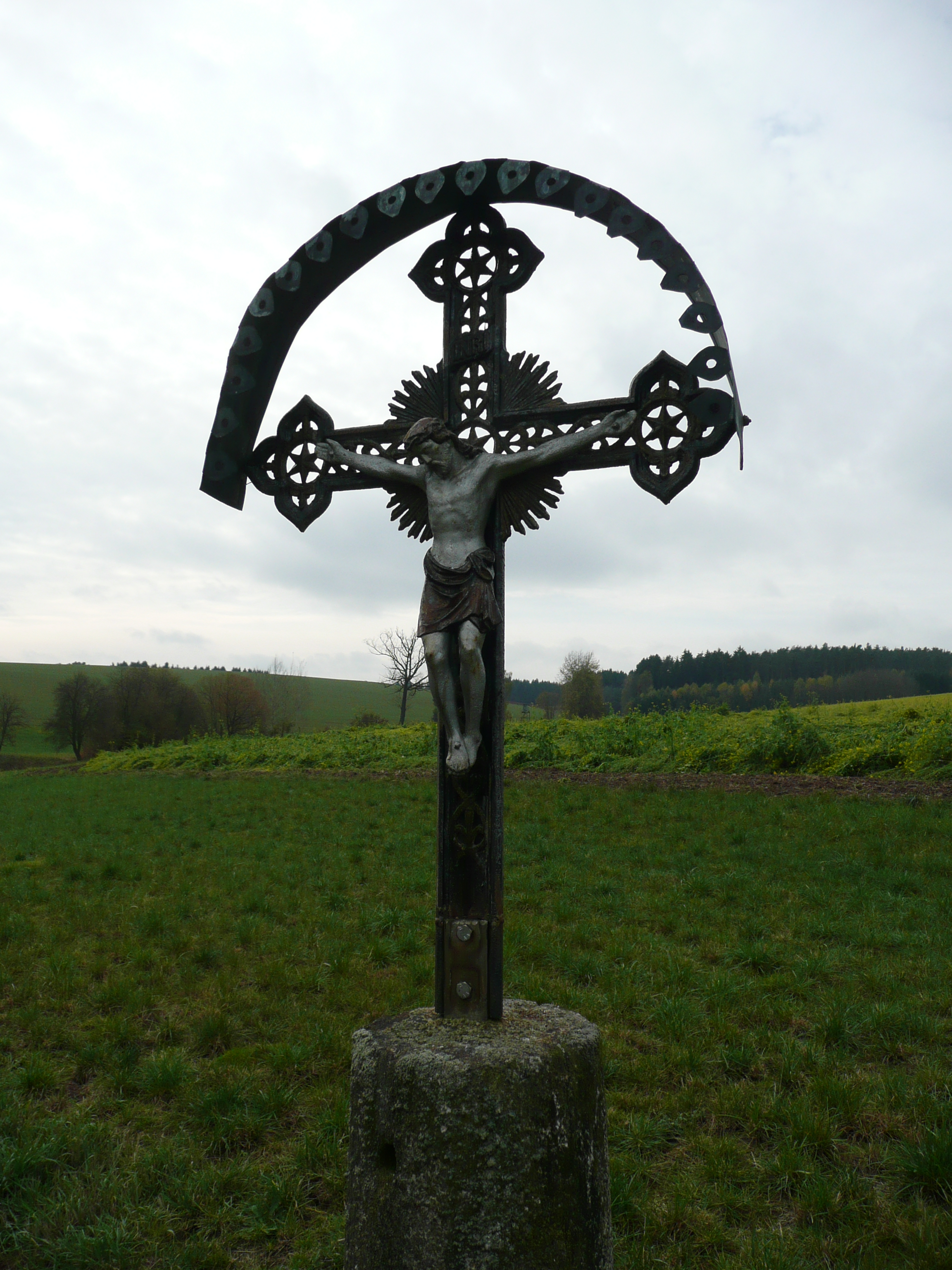 Hummelmühlmarterl Hummelmühle Gemarkung Massenricht, Hirschau, Bayern